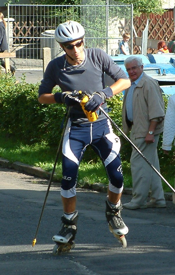 Maxime Laheurte during the Sommer Gand Prix in Steinbach-Hallenberg